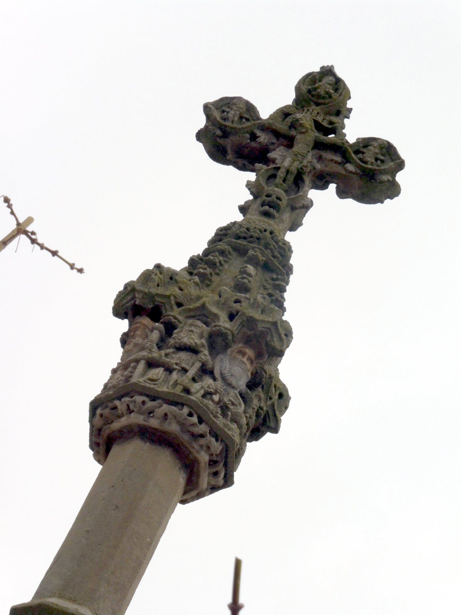 Creu de terme de Boldú (la Fuliola): anvers amb la figura del Crucificat